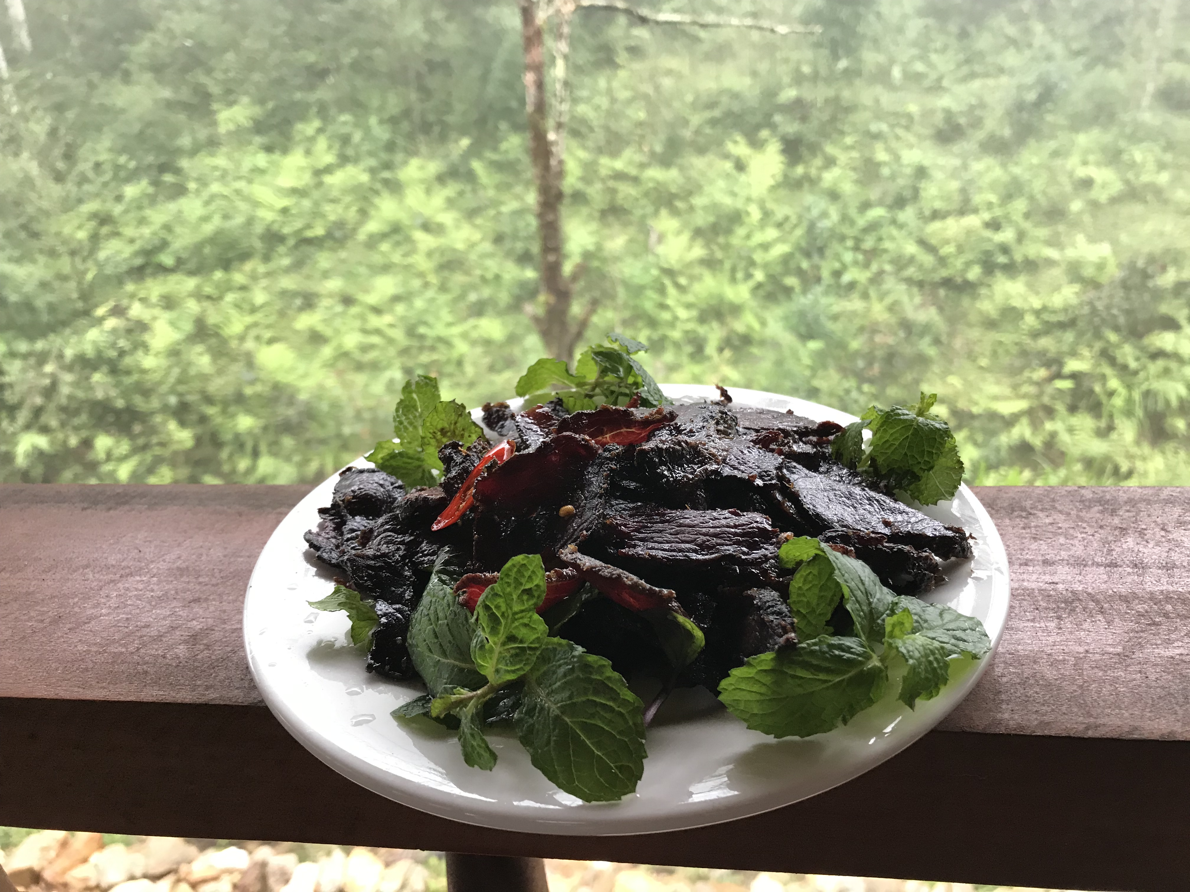 Thịt trâu gác bếp Tả Phìn Hồ